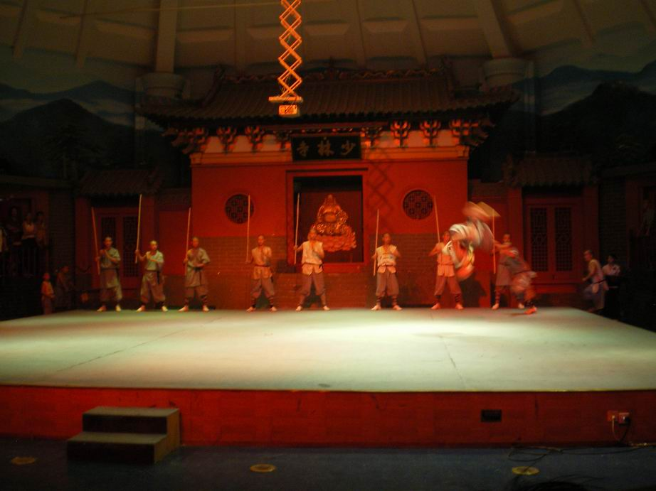 מופע קונג פו במקדש השאולין, מחוז חנאן, סין רישיון נוצר על ידי משתמש:Gsella